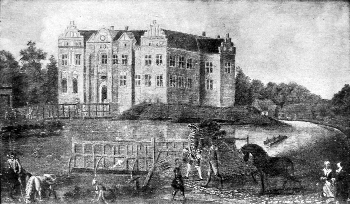 Villestrup (Willestrup) er en herregård i Astrup Sogn, Hindsted Herred, Region Nordjylland, Mariagerfjord Kommune. Maleri fra 1700'tallet